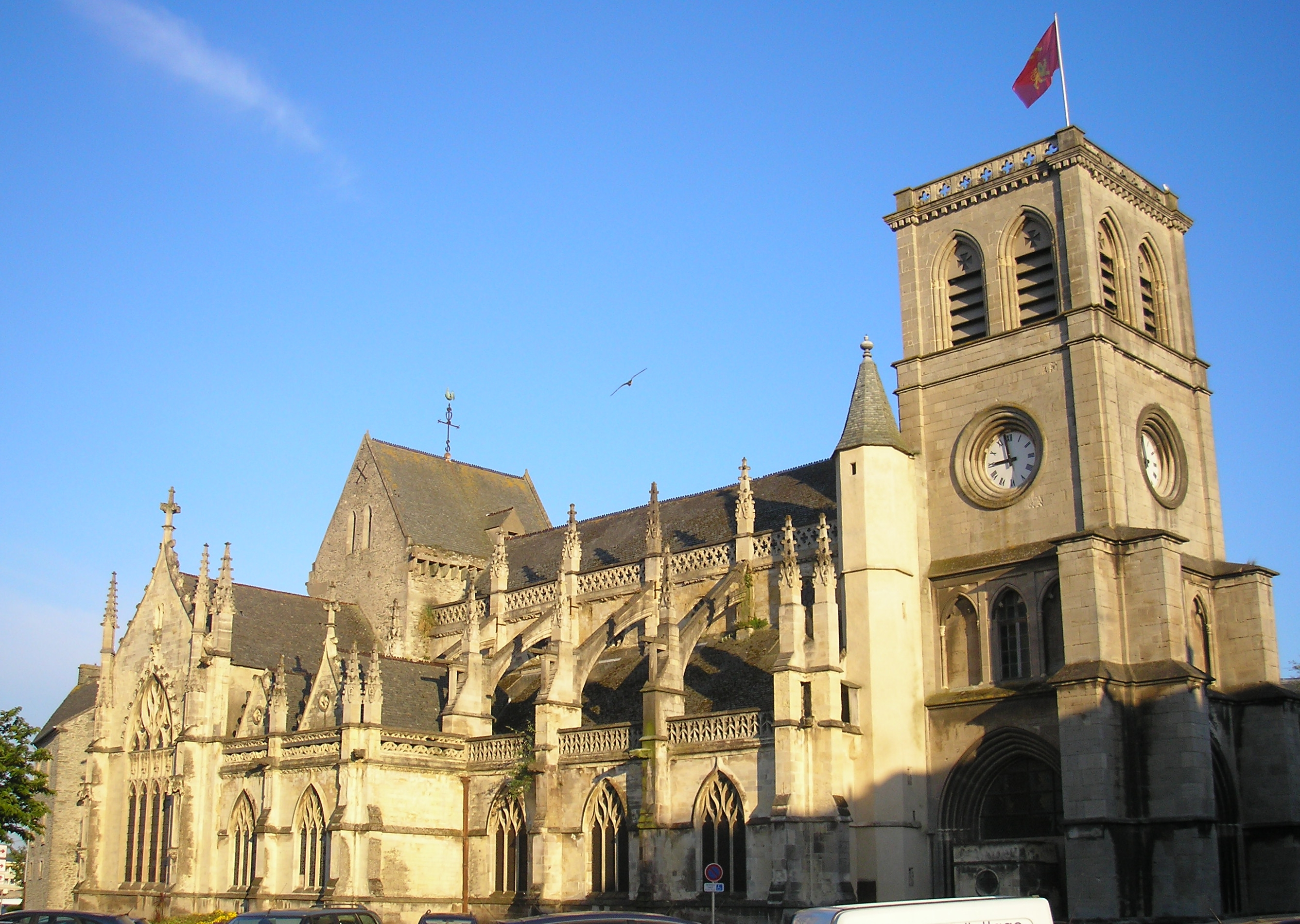 Cherbourg (Normandie, France). La basilique Sainte-Trinité (côté nord).